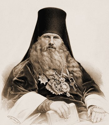 Евсевий (Ильинский), архиеп. Тверской и Кашинский. Литография П. Ф. Бореля. Нач. 60-х гг. XIX в. (ГИМ)